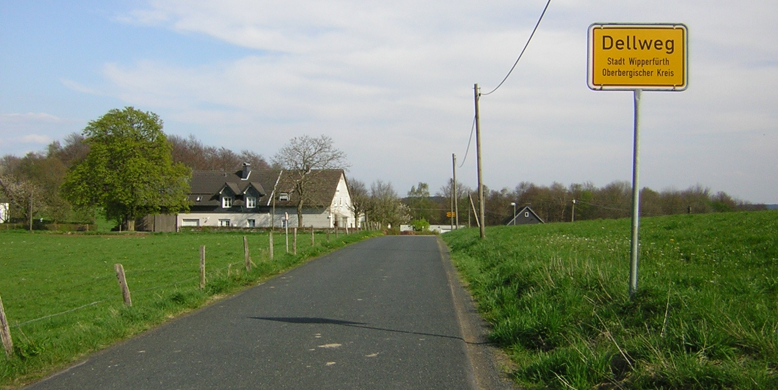 Dellweg in Wipperfürth Aufgenommen: 2005 mit Nikon Coolpix 2200